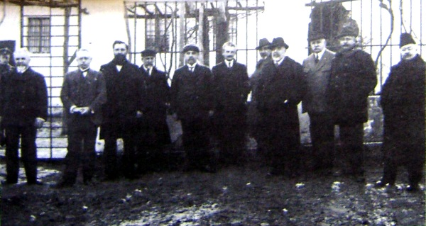 Водачи на Конституционния блок (Георги Данаилов, Йосиф Фаденхехт, Никола Мушанов, Александър Малинов, Димитър Яблански, Михаил Маджаров, Стоян Данев, Теодор Теодоров и други) в Шуменския затвор